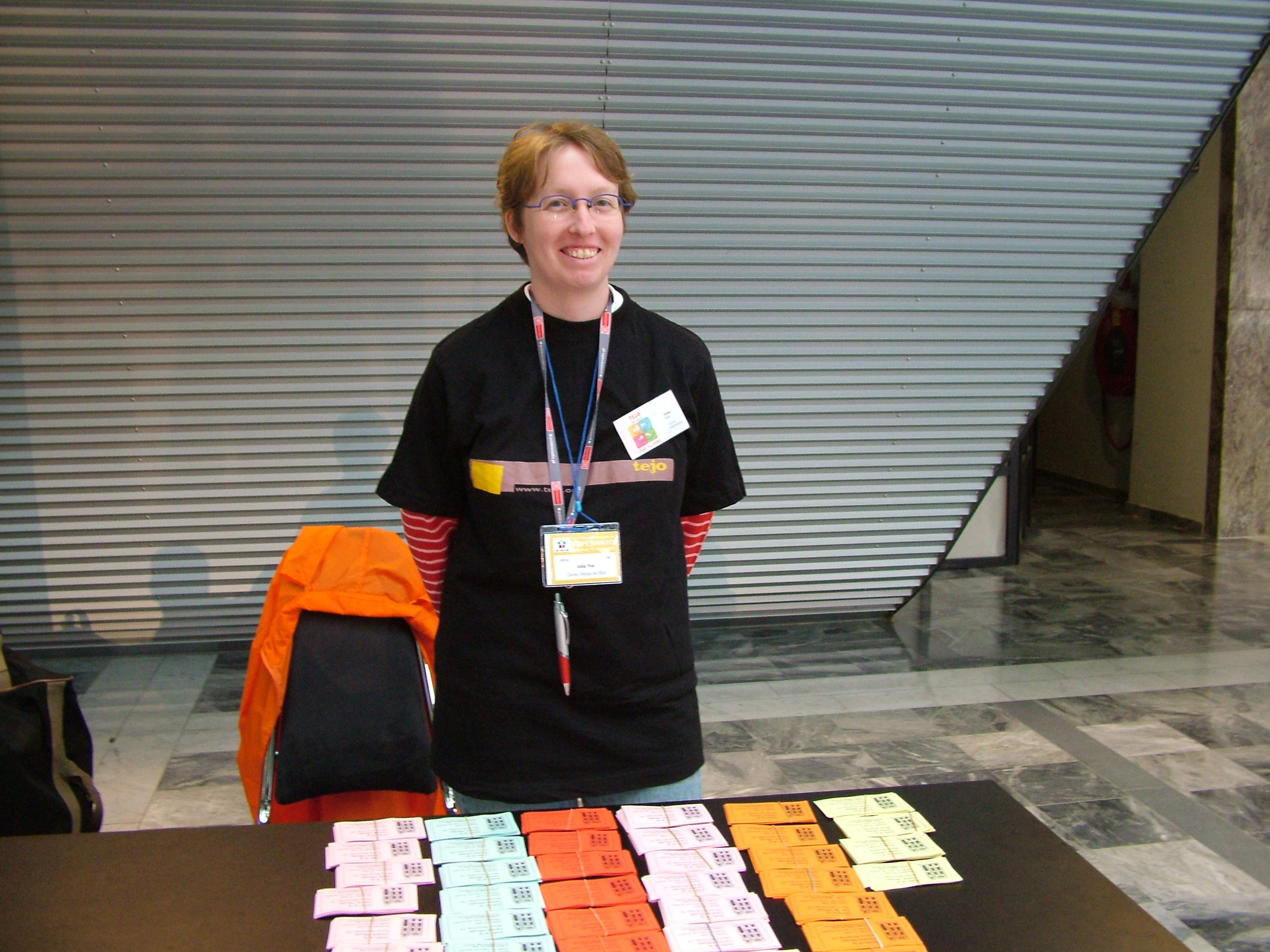 Universala Kongreso de Esperanto, Roterdamo 2008. TEJO-stando kun volontulino Julia Noe.